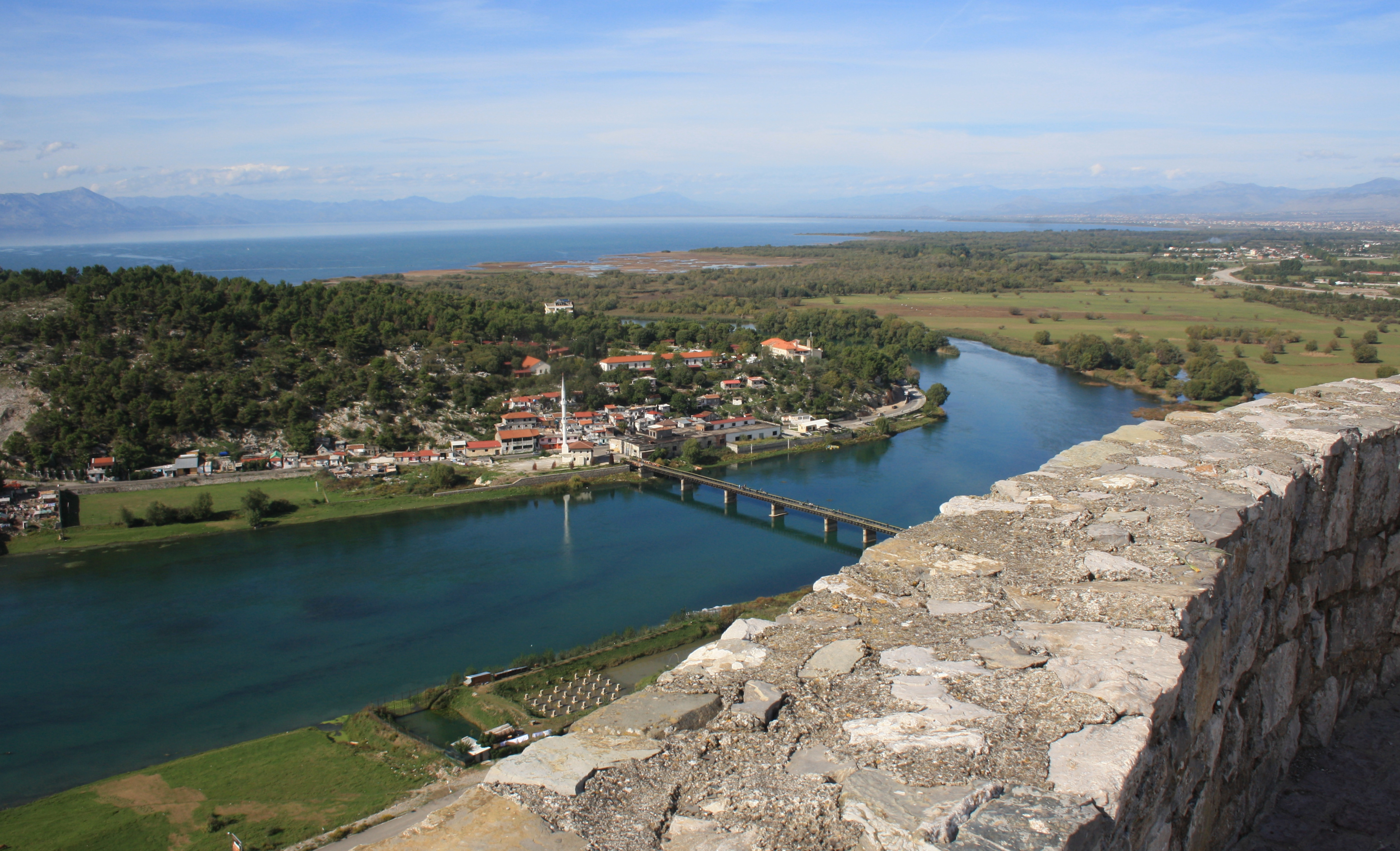 Lumi Buna-Veiipoje, Shkoder